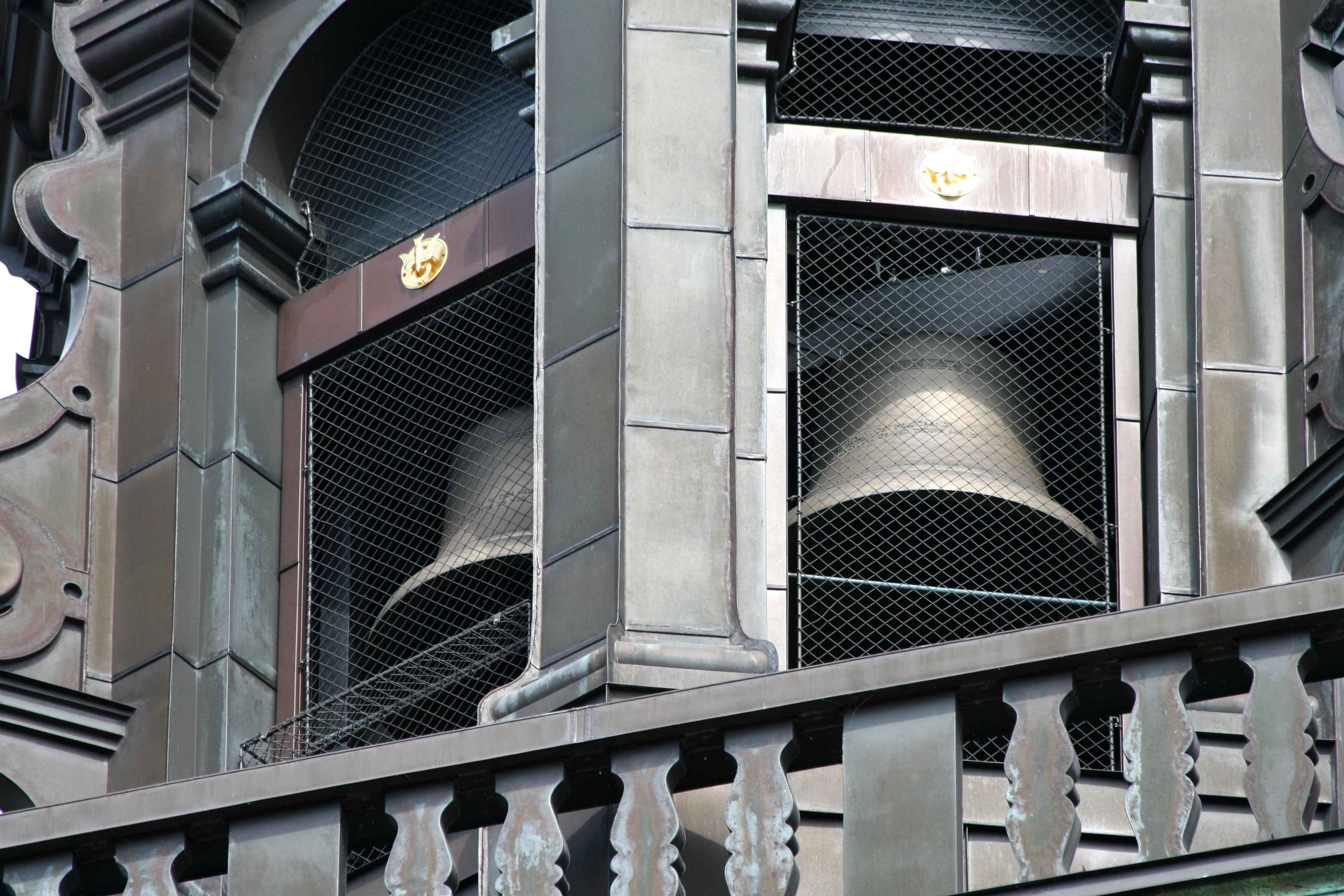 Helligåndskirken, Copenhagen, Denmark. Bells of the carillon.